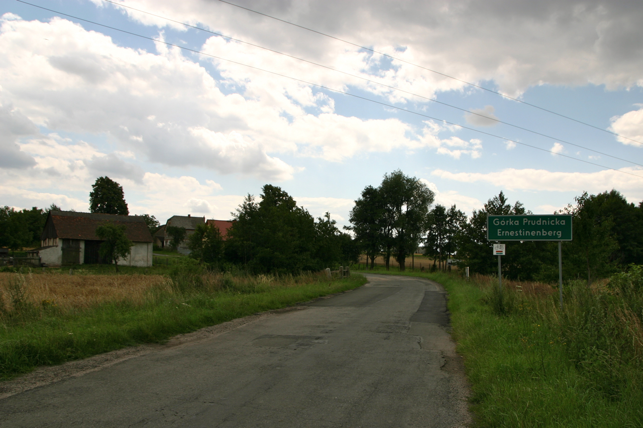 Górka Prudnicka (dodatkowa nazwa w j. niem. Ernestinenberg) – wieś w Polsce położona w województwie opolskim, w powiecie prudnickim, w gminie Biała.